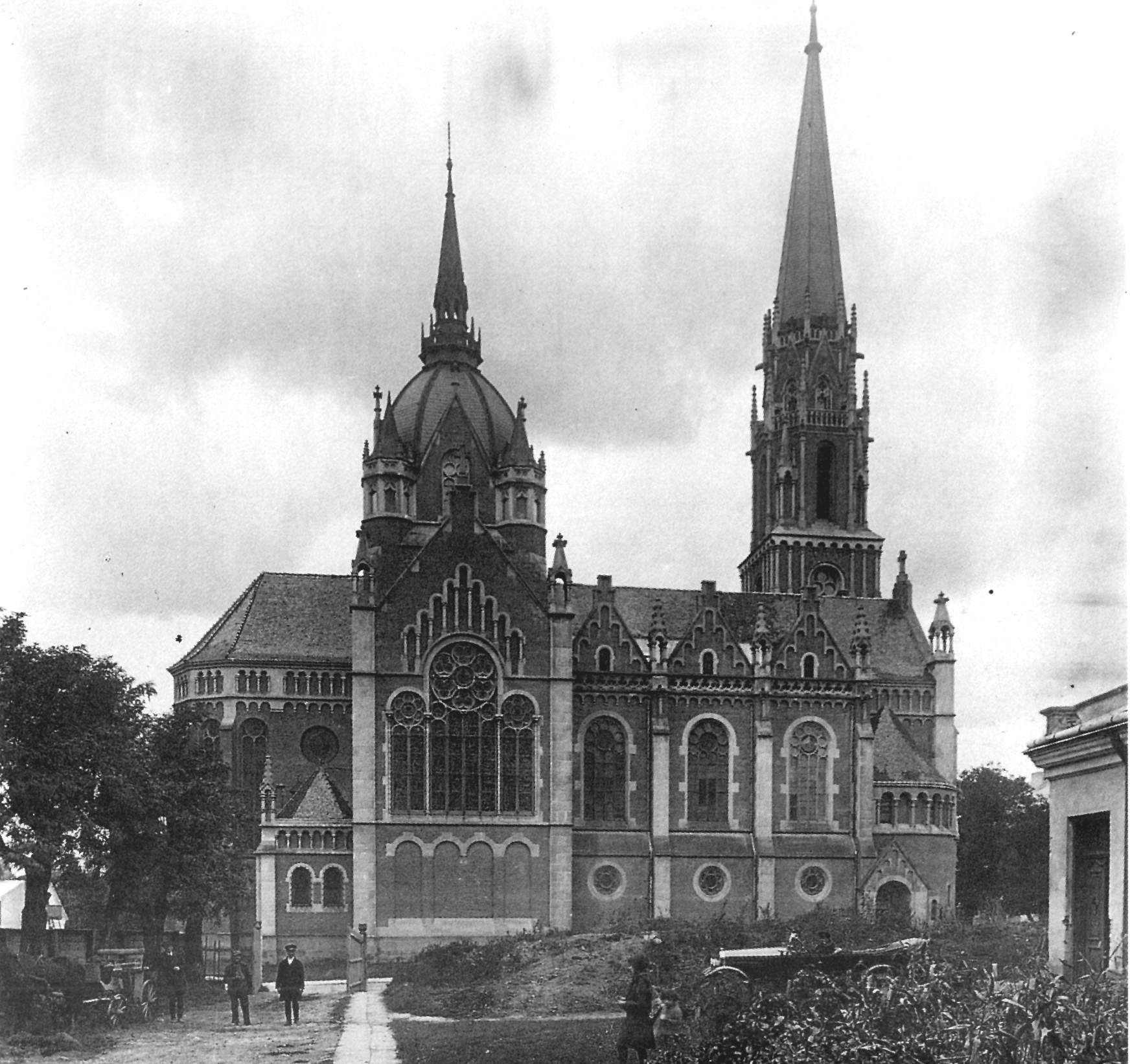 Тернопільський костел: Зараз на його місці є Універмаг